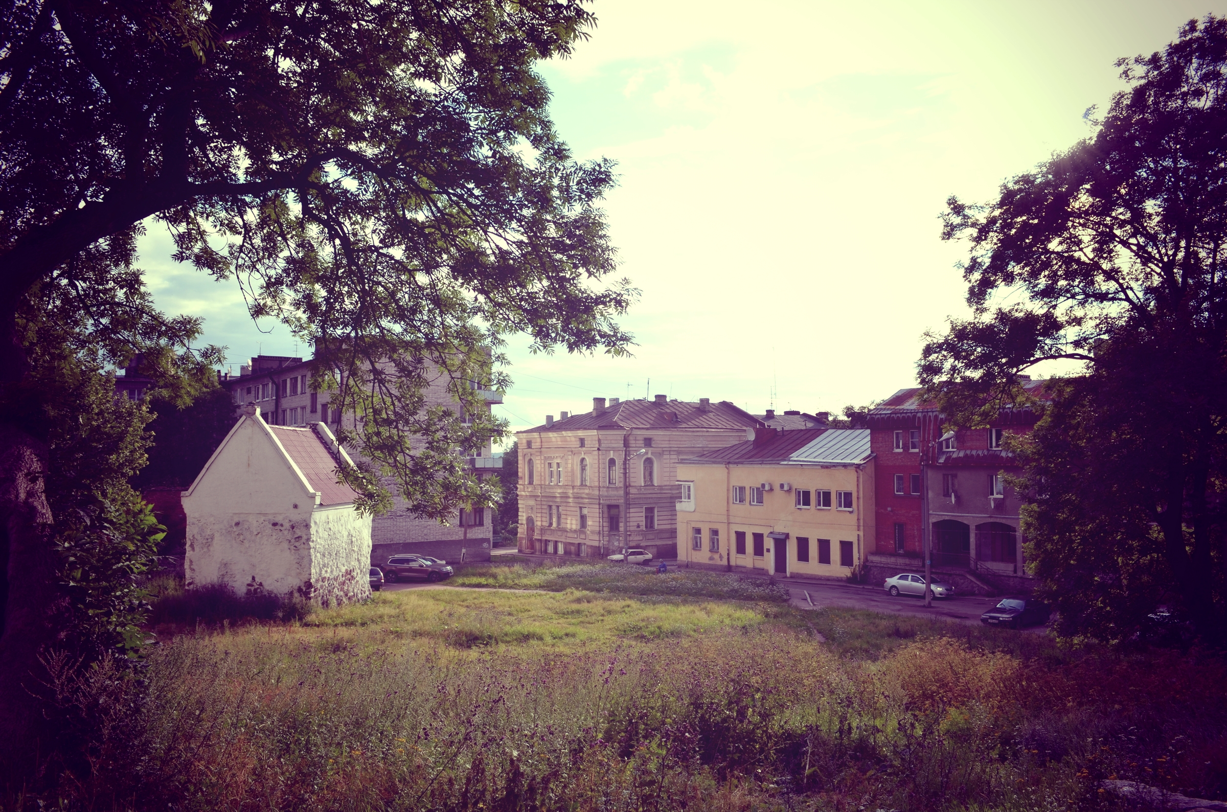 Выборгская улица,8